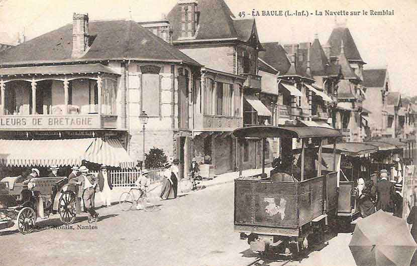 La Baule - La Navette